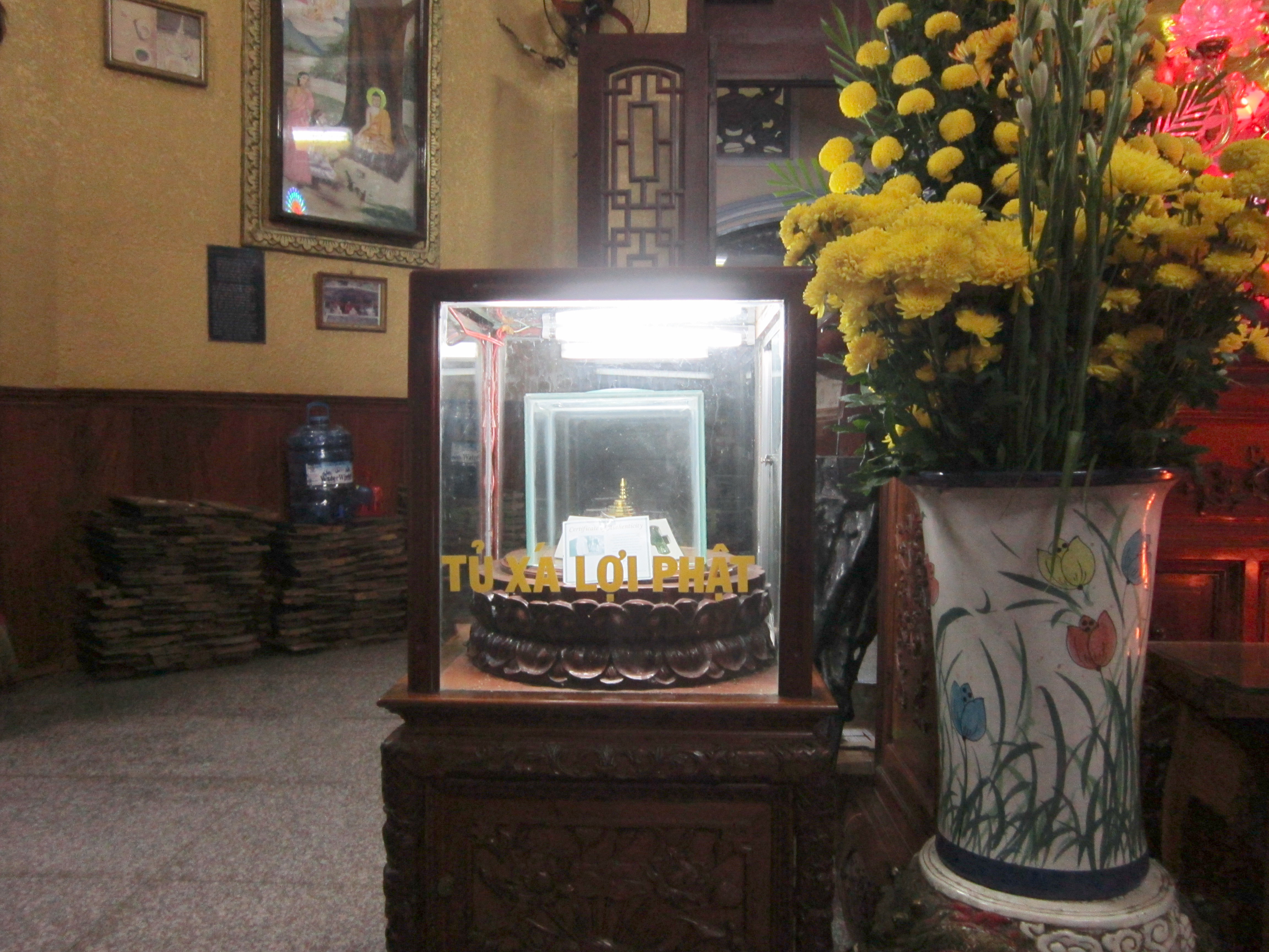 Tủ đựng viên Xá lợi Phật Thích Ca trong Bồ Đề Đạo Tràng (Châu Đốc, Việt Nam).